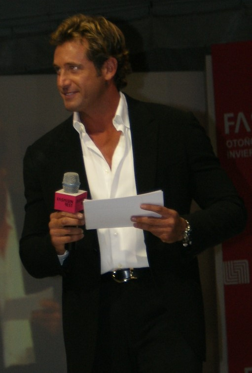 Gabriel Soto